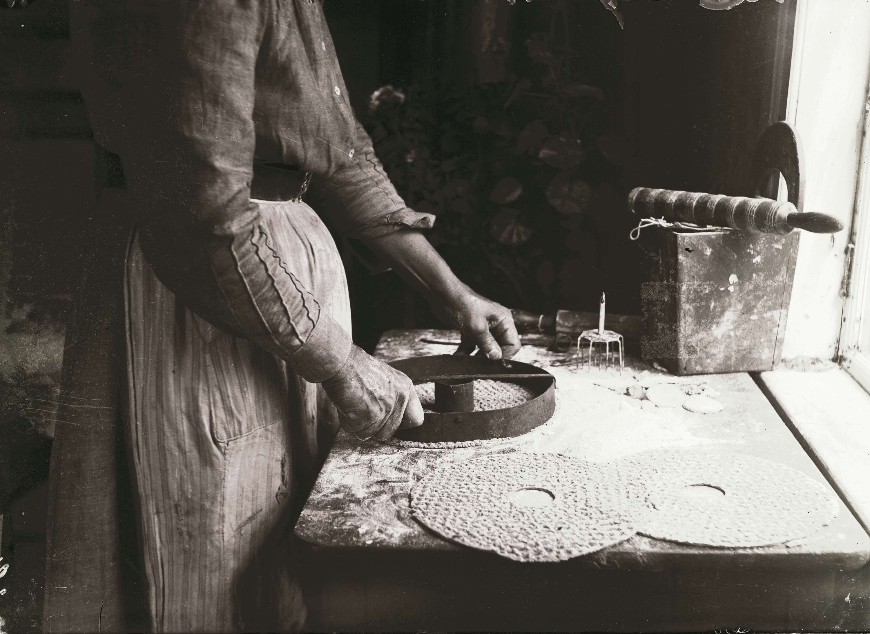 Knäckebrödsbakning. Kvinna stansar hål ur degen med ett brödmått. Bjurbäcken, Manskogs socken, Värmland. (Rättning: Platsen är troligtvis Mangskogs socken, som har artikel i svenska Wikipedia.)